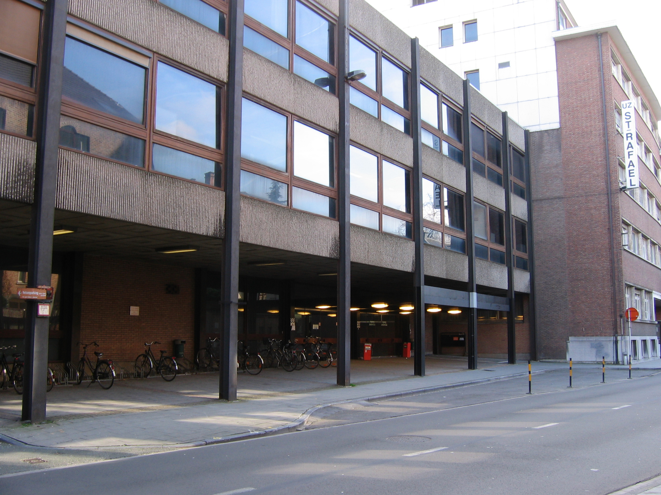 University Hospital Leuven, Sint-Rafael in Leuven, Belgium.